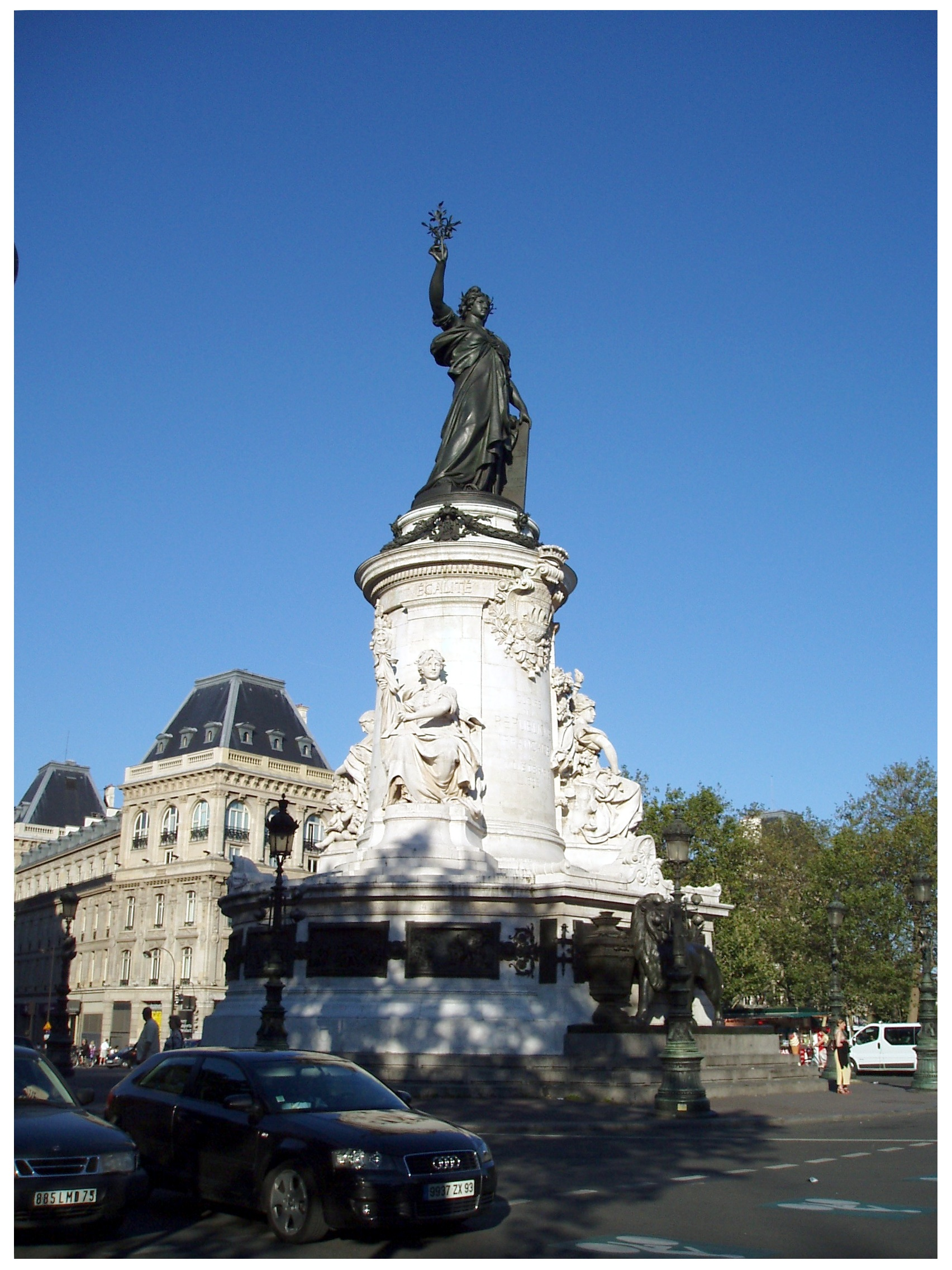 Imatge de la Place de la République a París